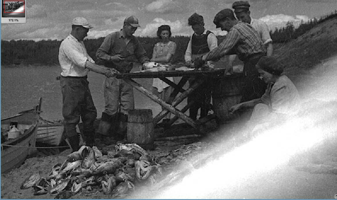 Tranchage de la morue à Rivière-à-la-Chaloupe en 1943 Les Bond de Rivière-à-la-Chaloupe, nous croyons reconnaître, de gauche à droite: Windam Bond, Walter Bond, Marie-Aimée Vibert son épouse, Hearl Bond, John Bond père et son épouse assise Anny Vibert